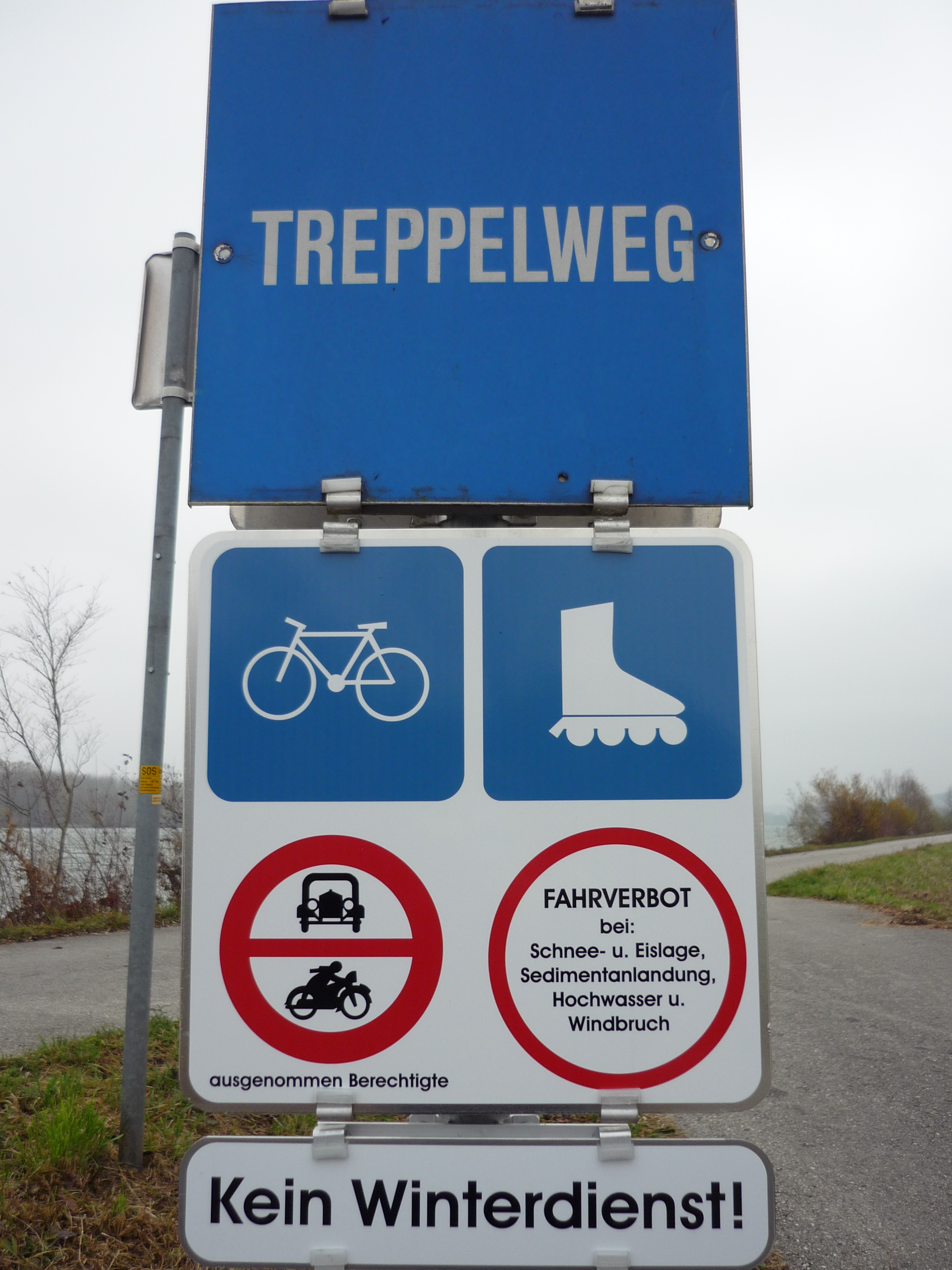 Treppelweg Informationstafel